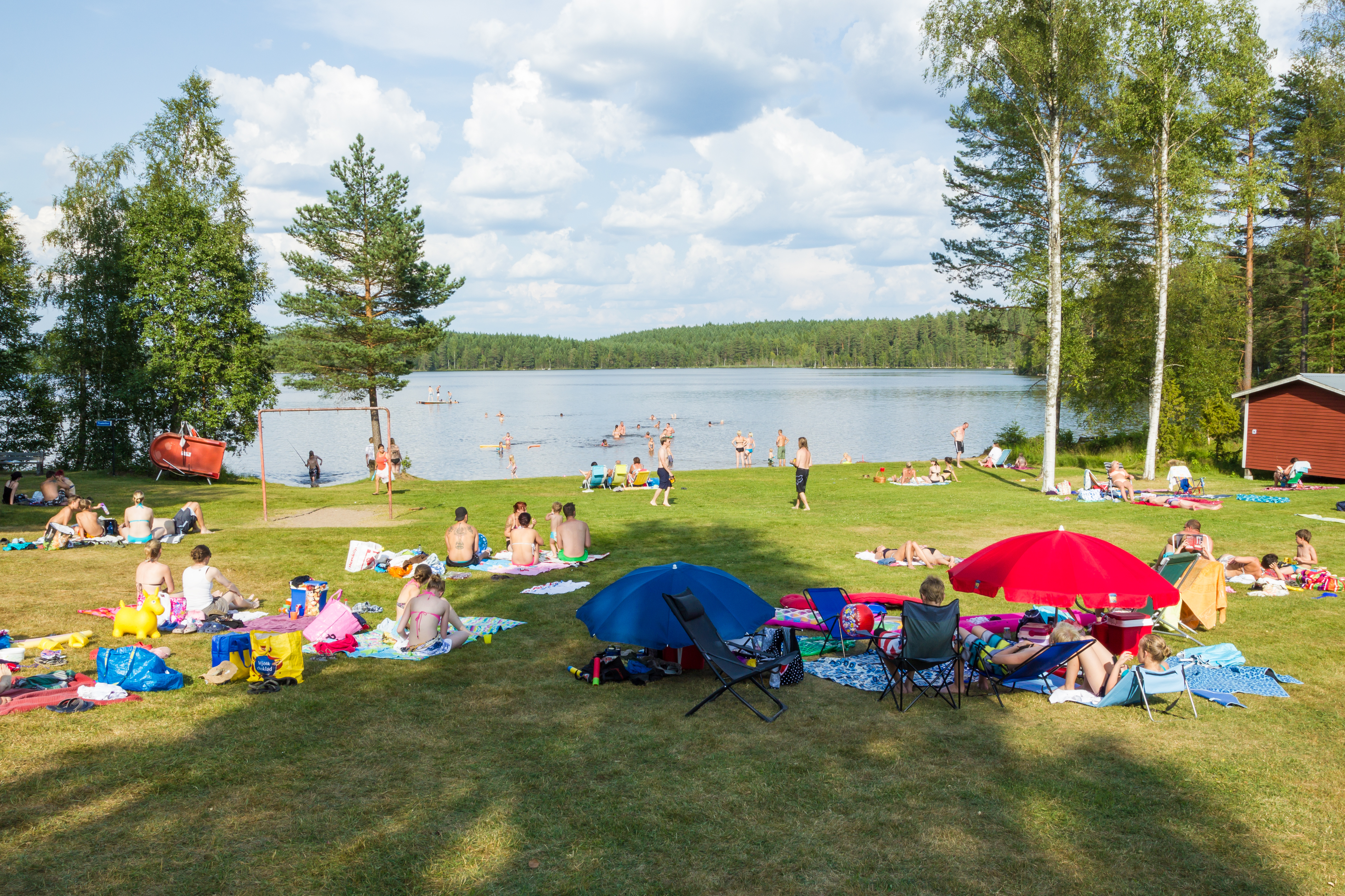 Pålsbenningsbadet, Hedemora kommun, Sverige.